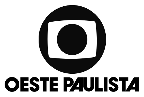 Logotipo da TV Globo Oeste Paulista, emissora de televisão brasileira sediada em Bauru - SP, utilizado de 1984 a 1998.